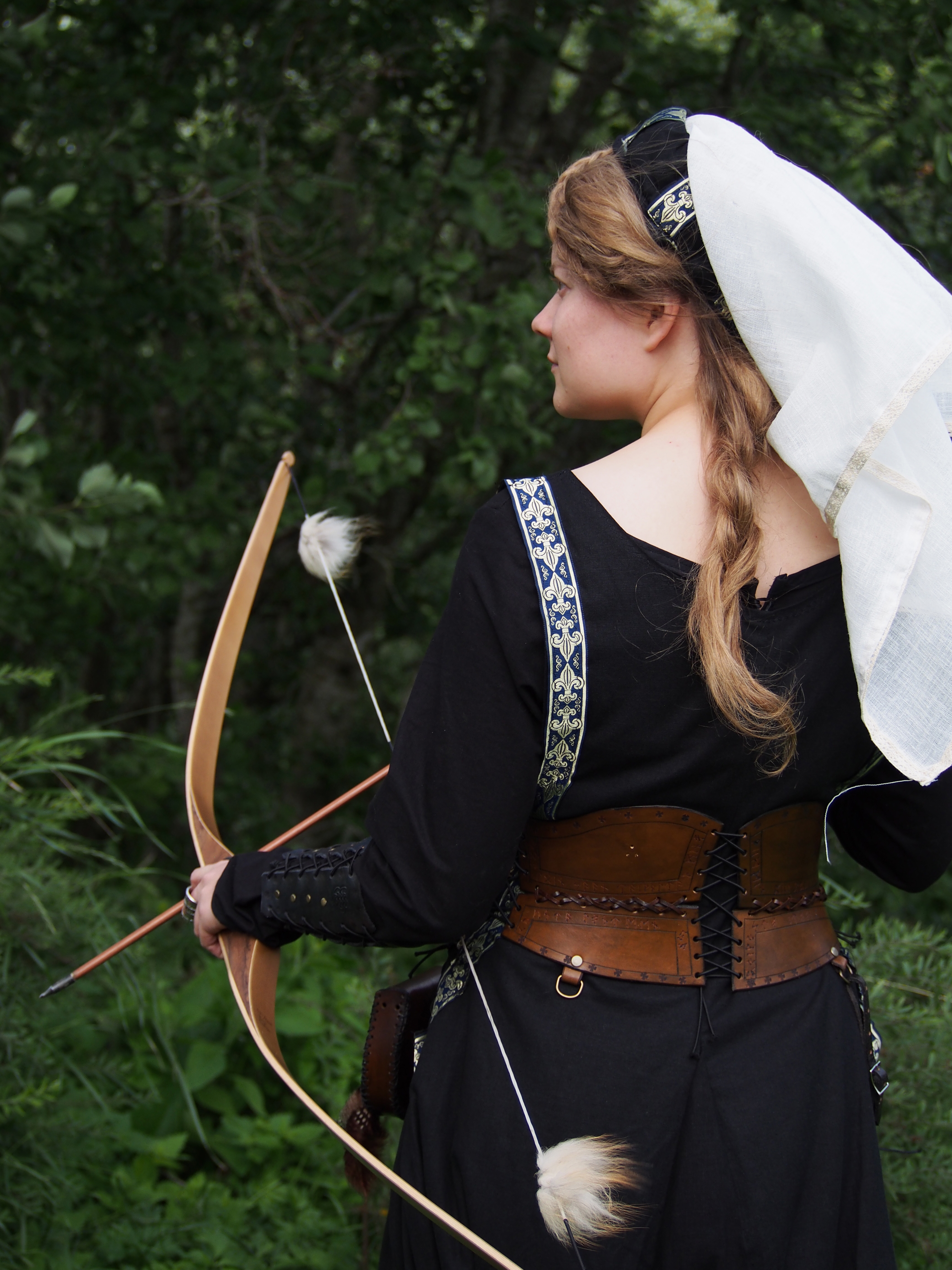 Kirjailija Tuuli Vuorma